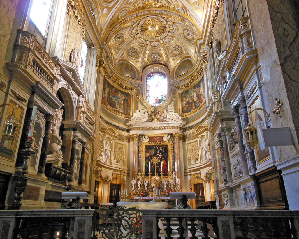 Roma, chiesa di Santa Maria dell'Anima, interno, coro e altar maggiore